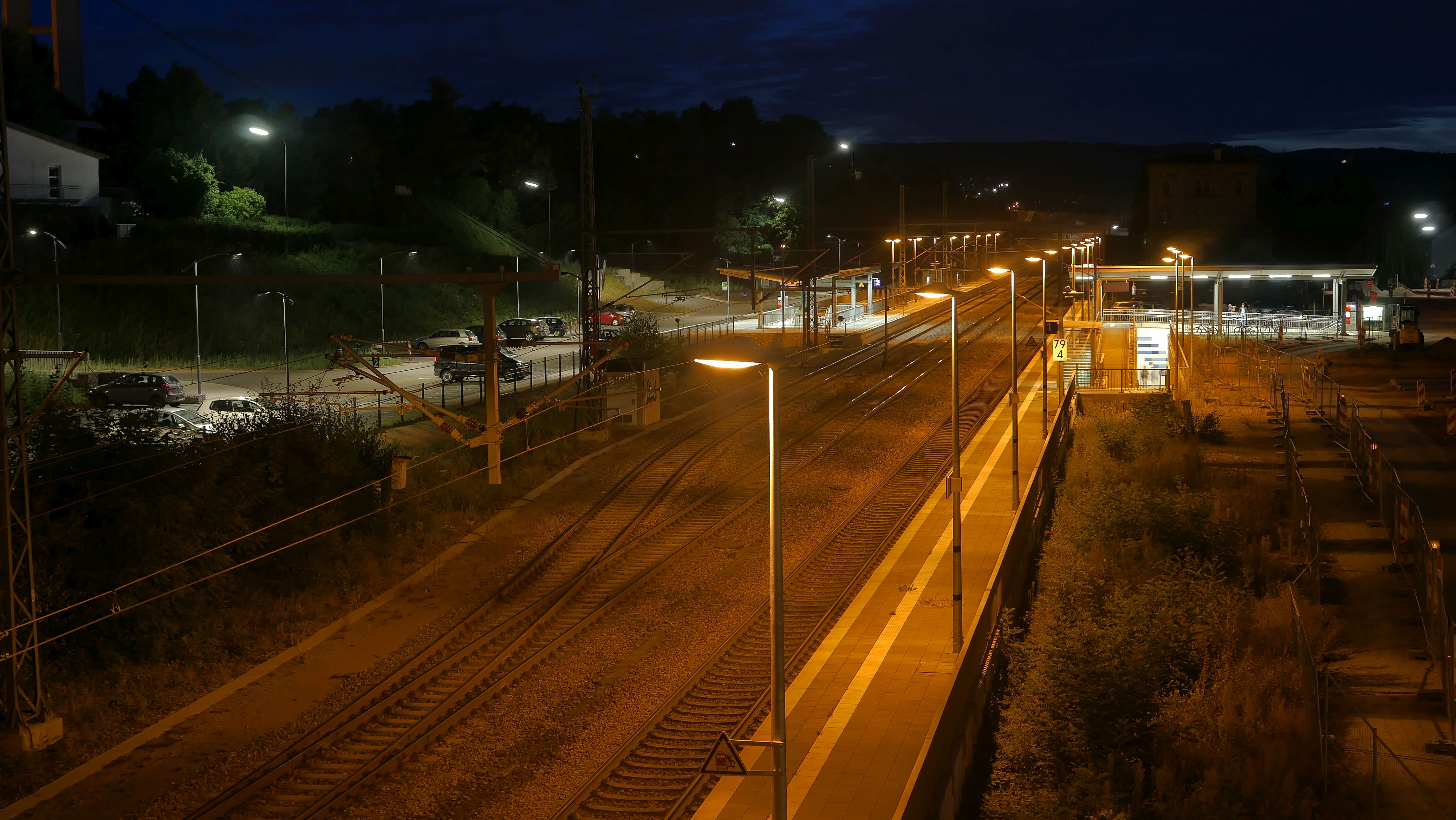 Konz (Rheinland-Pfalz), Neuer Haltepunkt "Konz Hauptbahnhof", wurde 2014 in Betrieb genommen.